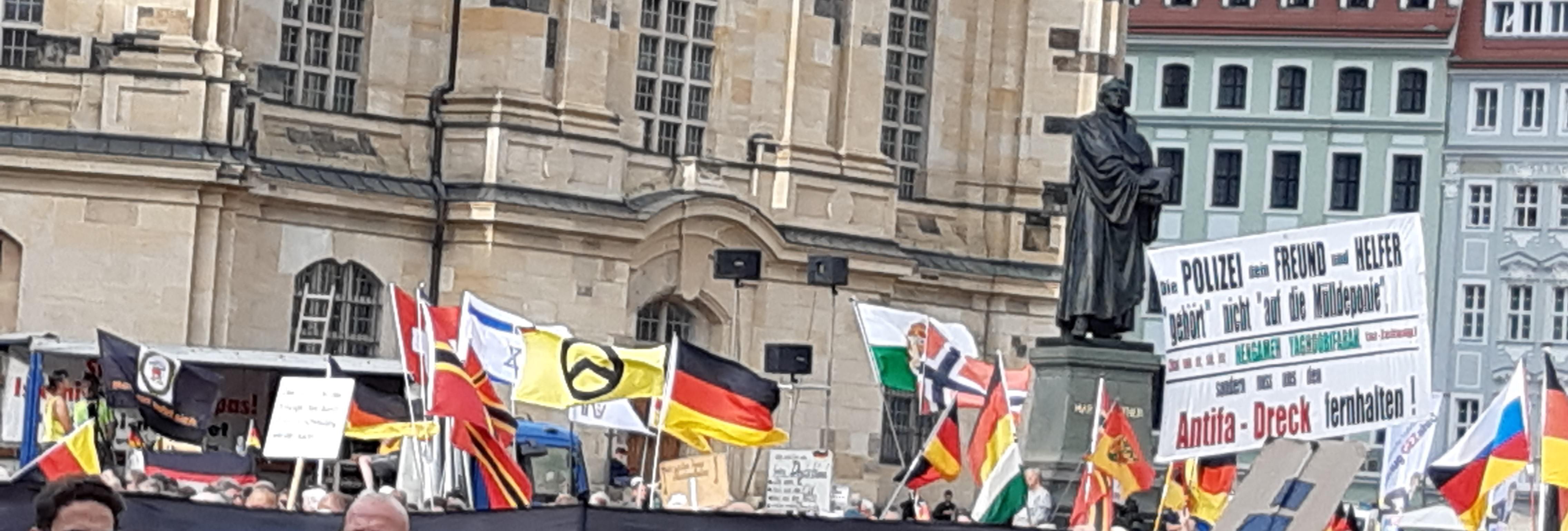 Pegida demonstriert am Dresdner Neumarkt